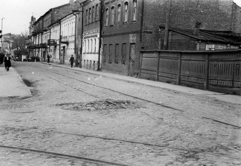 Weißrussland, Minsk, Straßenzug Strassen in Minsk, tiefe Löscher, in der Mitte schlecht angelegte Schienen. Minsk, Mai 1943 Foto: Lipke Film- u. Bild-Nr.: F.R. 13/26 Information added by Wikimedia users.Беларуская (тарашкевіца): Вуліцы ў Менску, кепска пракладзеныя рэйкі ў сярэдзіне здымка. Травень 1943 году.